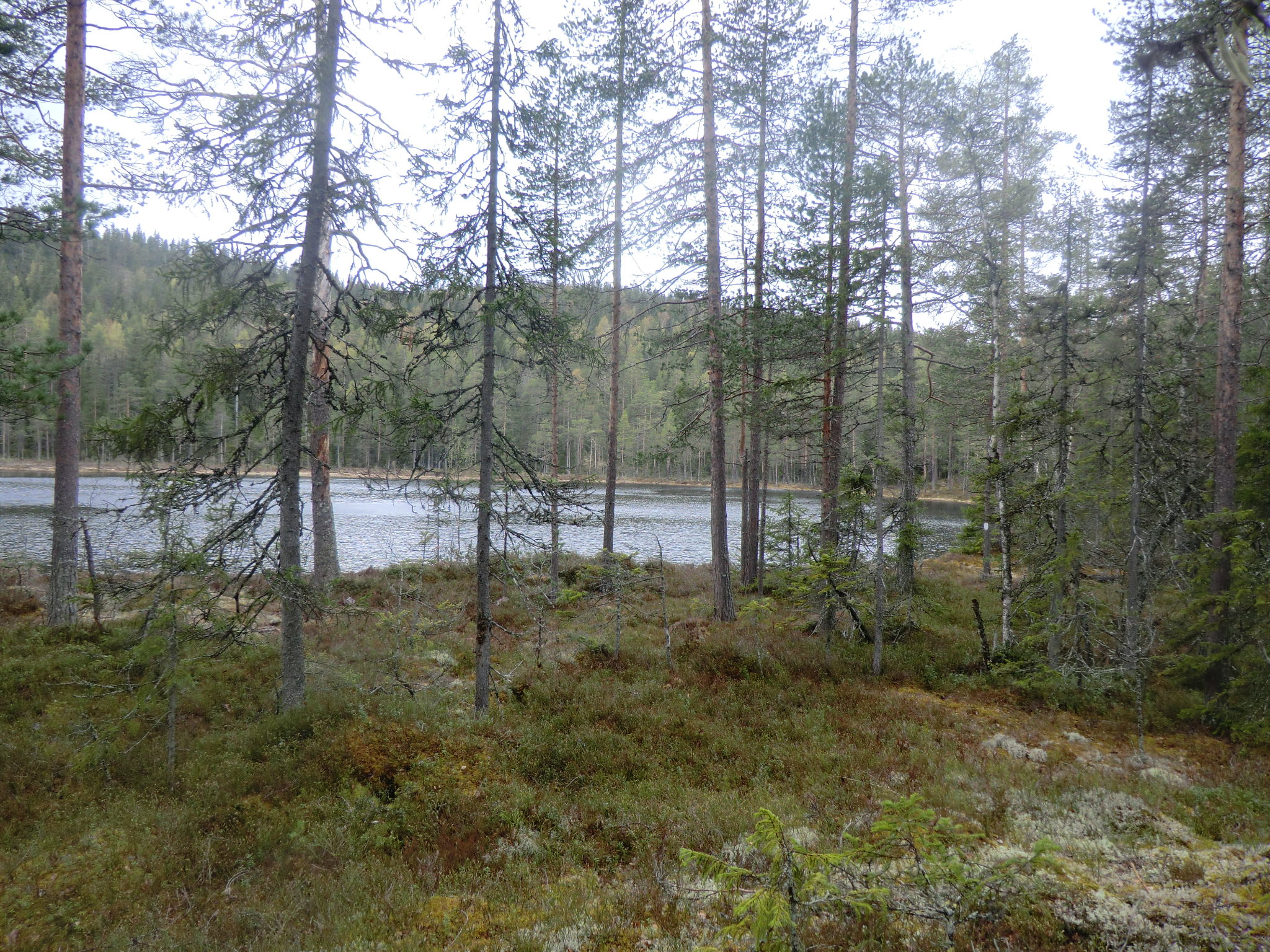 Lill-Abborrtjärnen från utloppet på norra sidan.